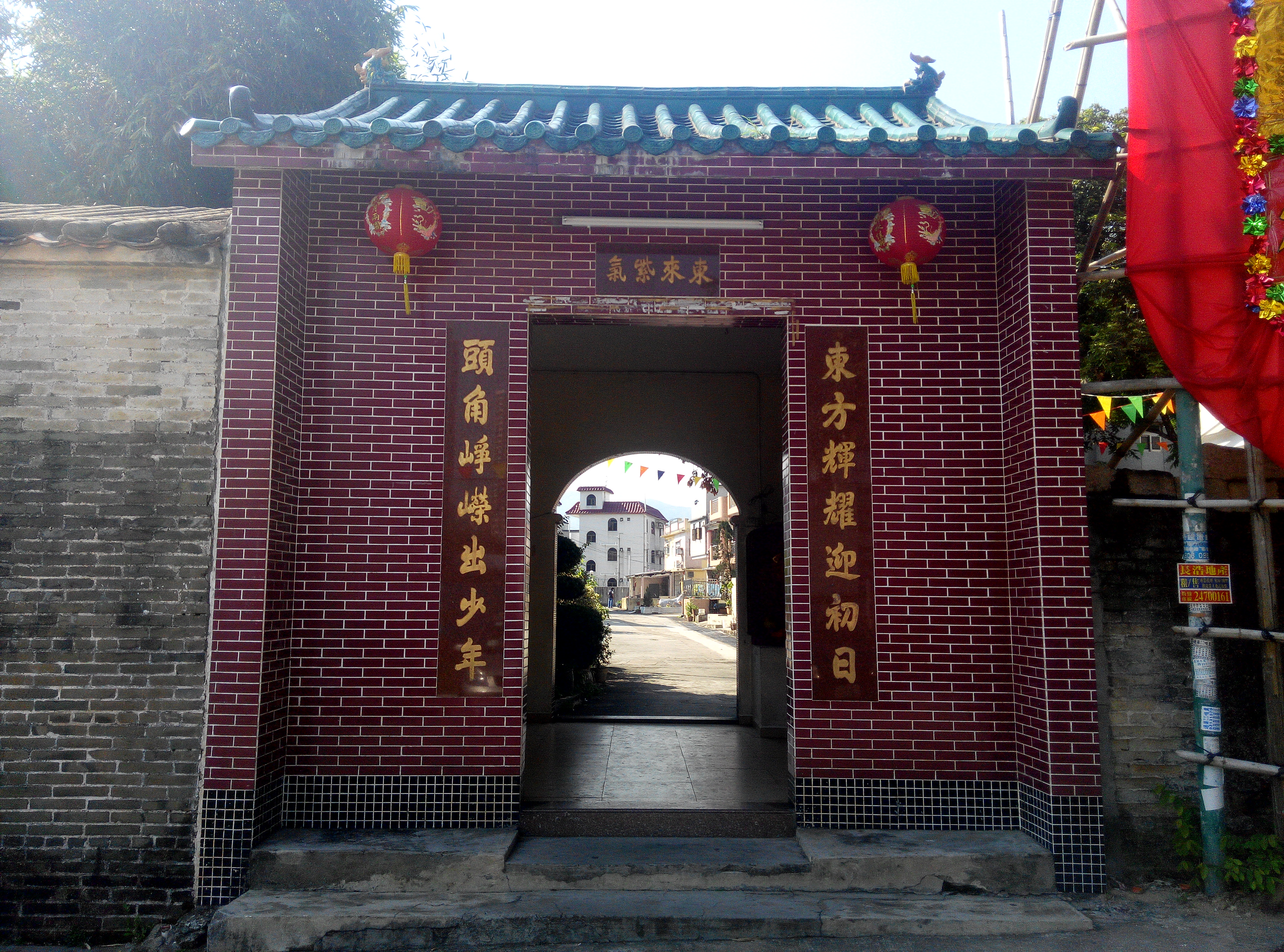 廈村東頭村門樓